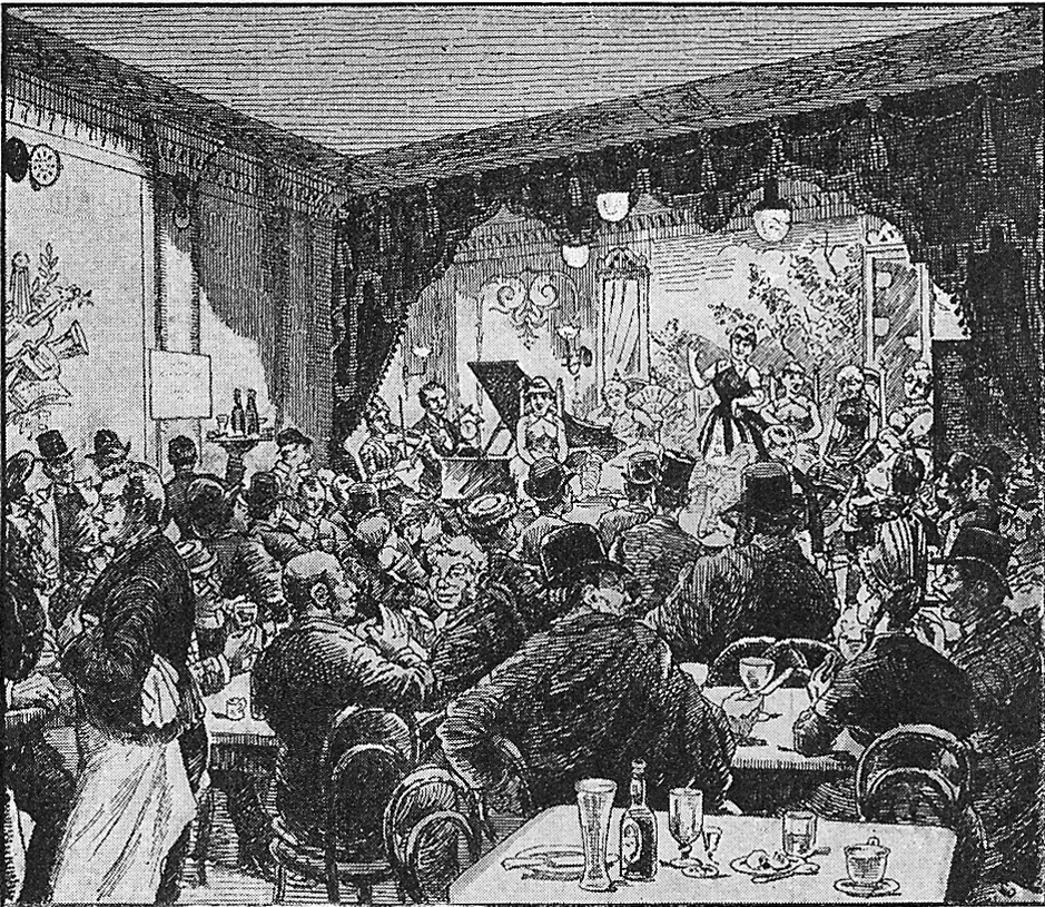 Det indre af Kehlets Café chantant. Sidste halvdel af 1800-tallet.